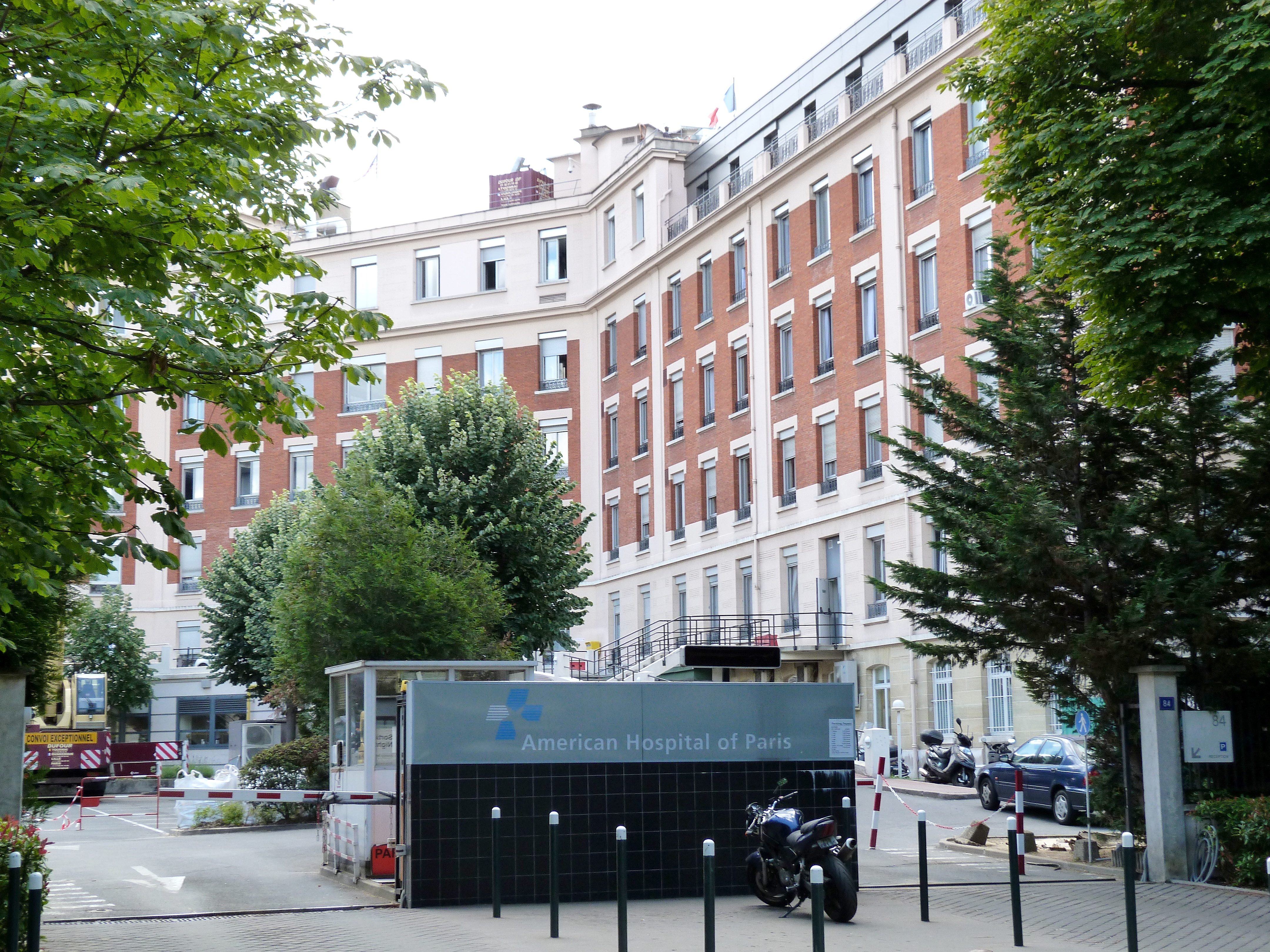 Entrée de l'hôpital américain de Paris à Neuilly-sur-Seine (Hauts-de-Seine).